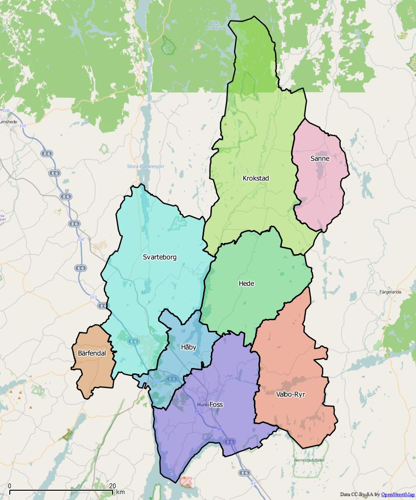 Distriktsindelningen i Munkedals kommun World file: 94.88092564228641379 0 0 -94.88092564228641379 1259468.62157130124978721 8144438.34580510295927525